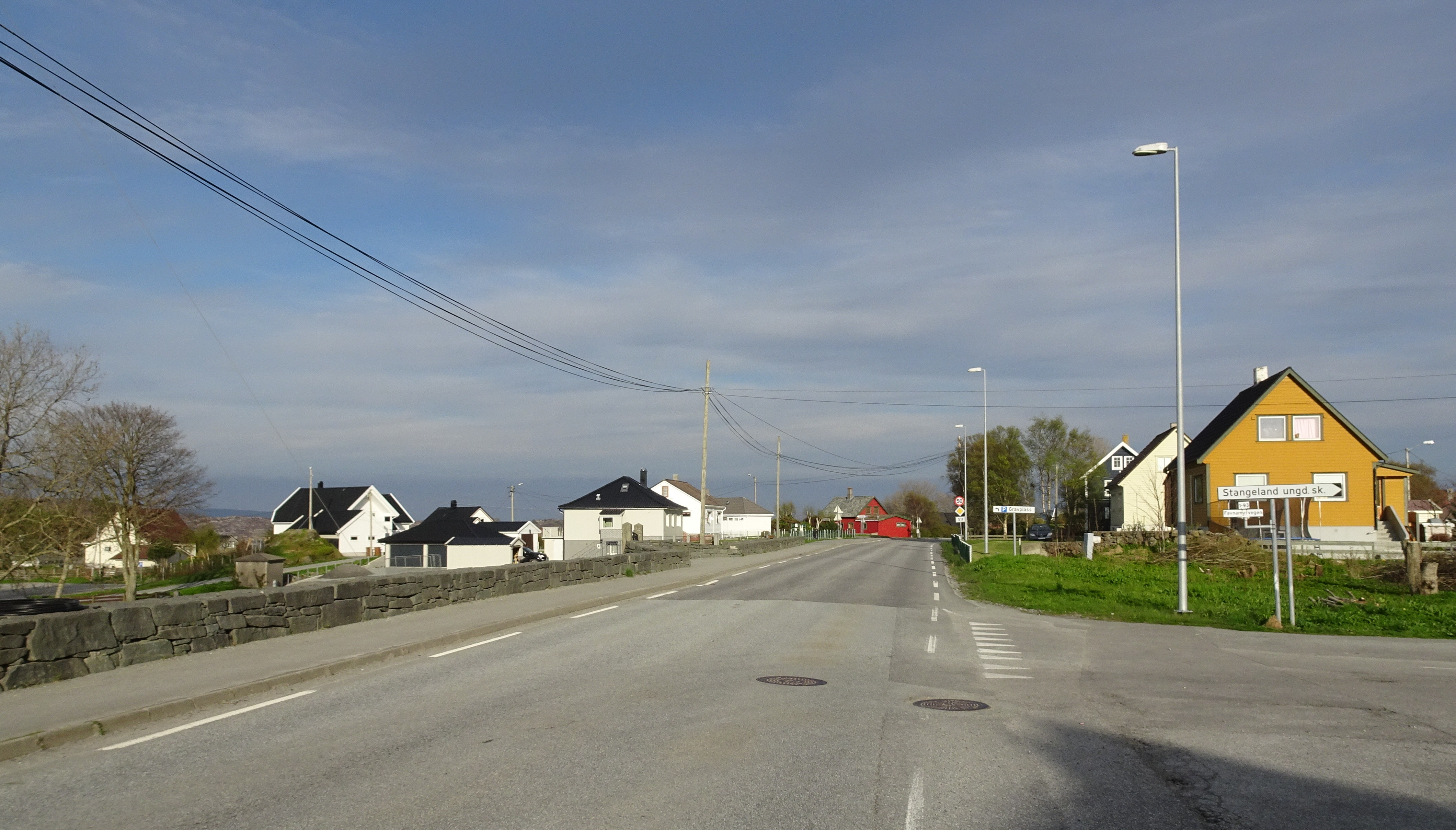 Austre Karmøyveg (primær fylkesvei 511) like ved Stangeland gravplass